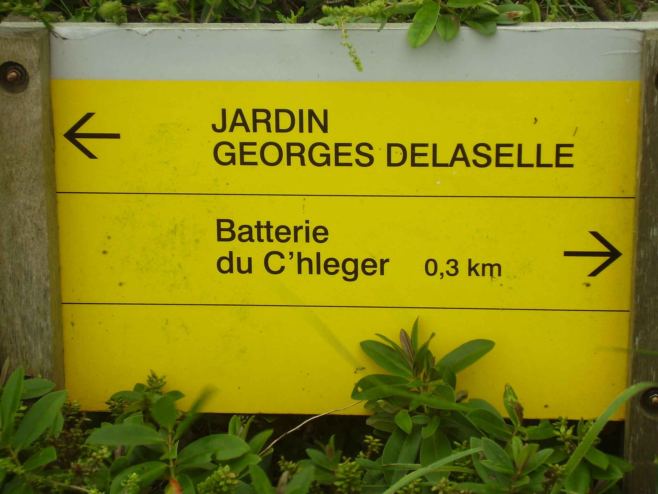 Île de Batz, near Roscoff, Bretagne; Frankreich